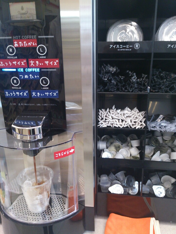 @ セブンイレブン 熊谷市役所前店 (posted via FlickSquare)